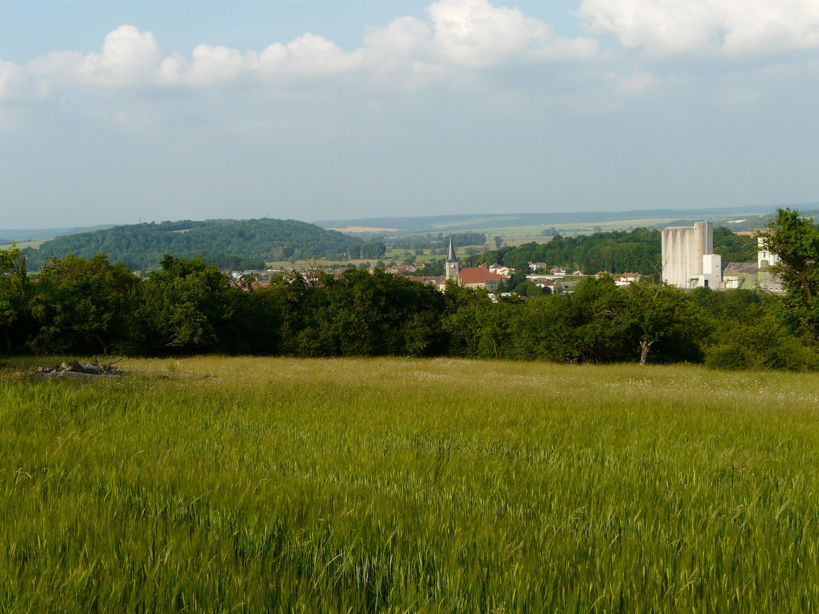 Vue de Void-Vacon depuis le lieu-dit "les Ormes" au sud-ouest de la commune. A l'arrière-plan, à gauche, la colline de Châtel Saint-Jean, au centre la vallée de la Meuse; au second plan le village.